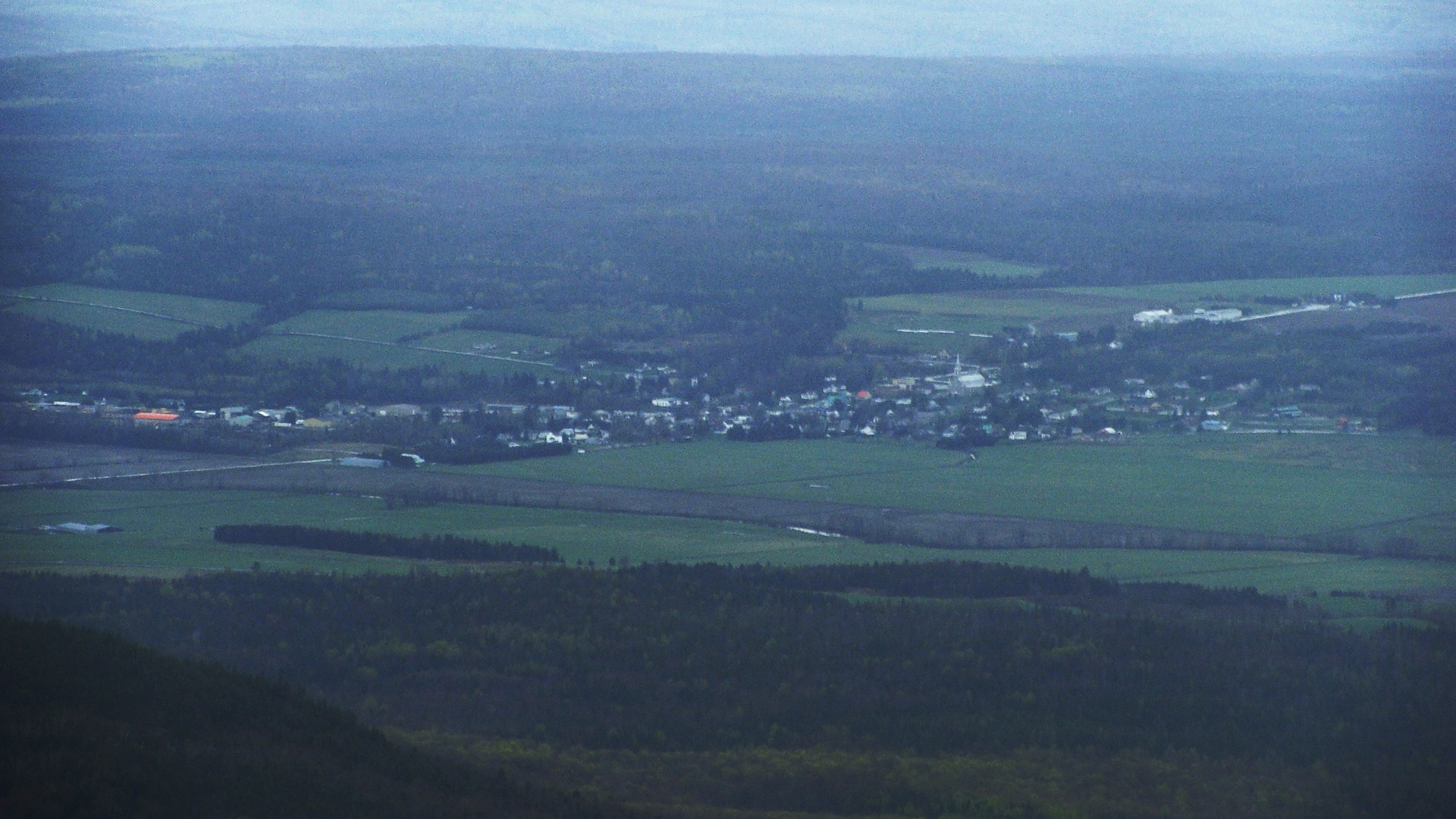 Village de La Patrie, au Québec (Canada). Vue du Mont Mégantic.